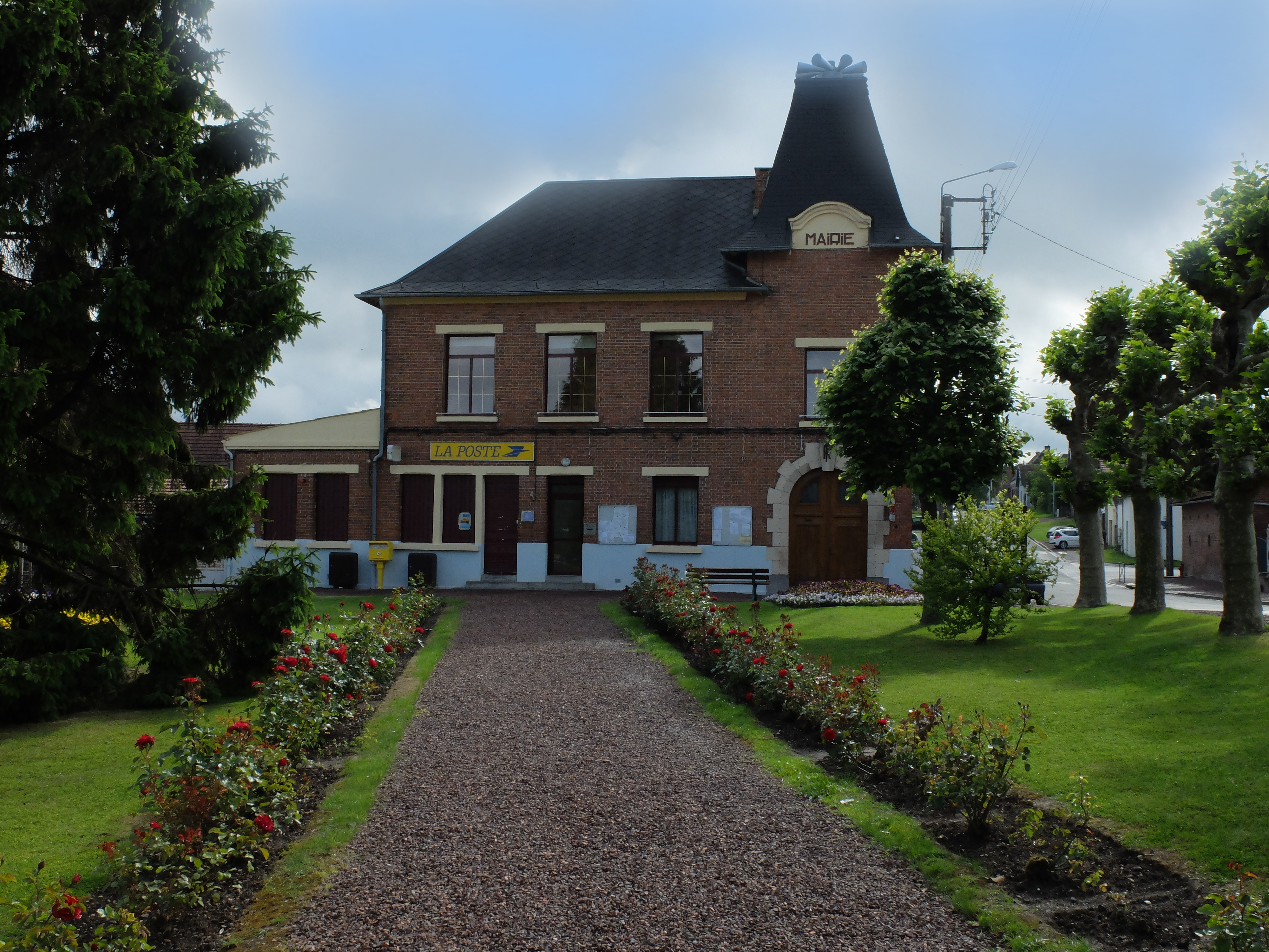 Vue de la mairie de Bourlon.